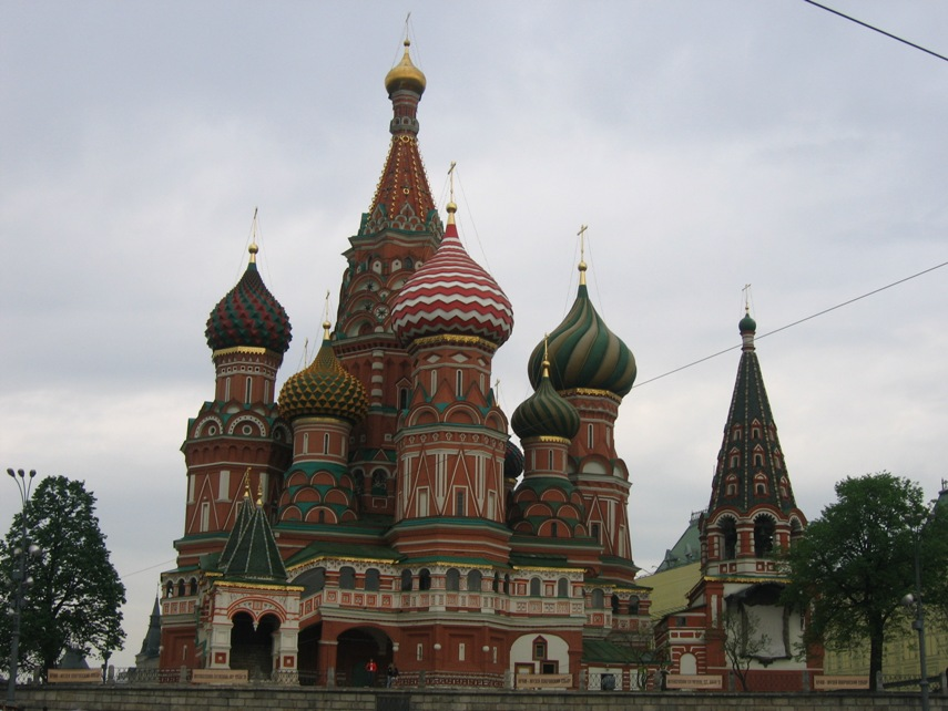 Cathédrale Saint-Basile (monument de la place rouge à Moscou en Russie)